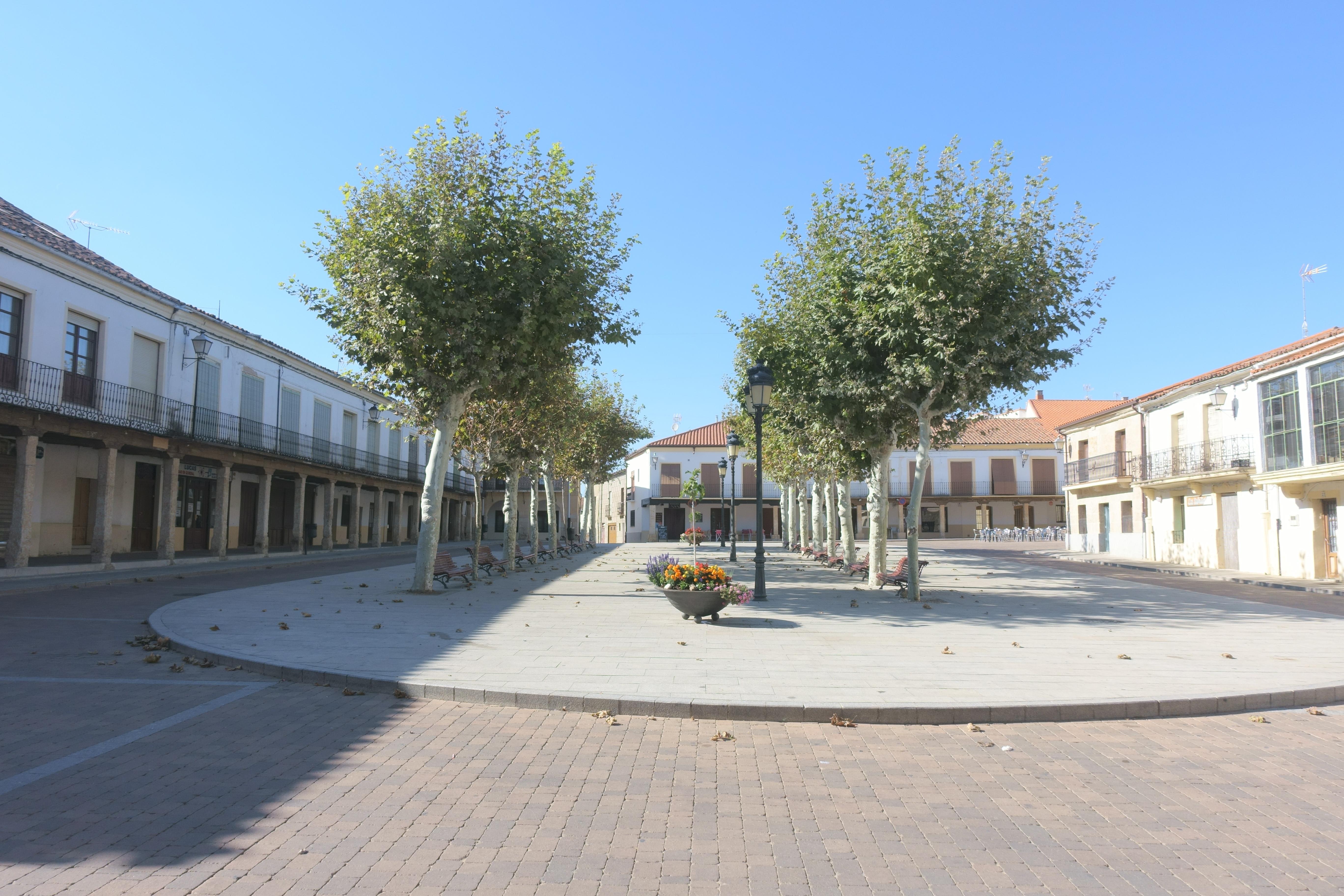 Plaza Mayor de Fuentesaúco (Zamora, España).